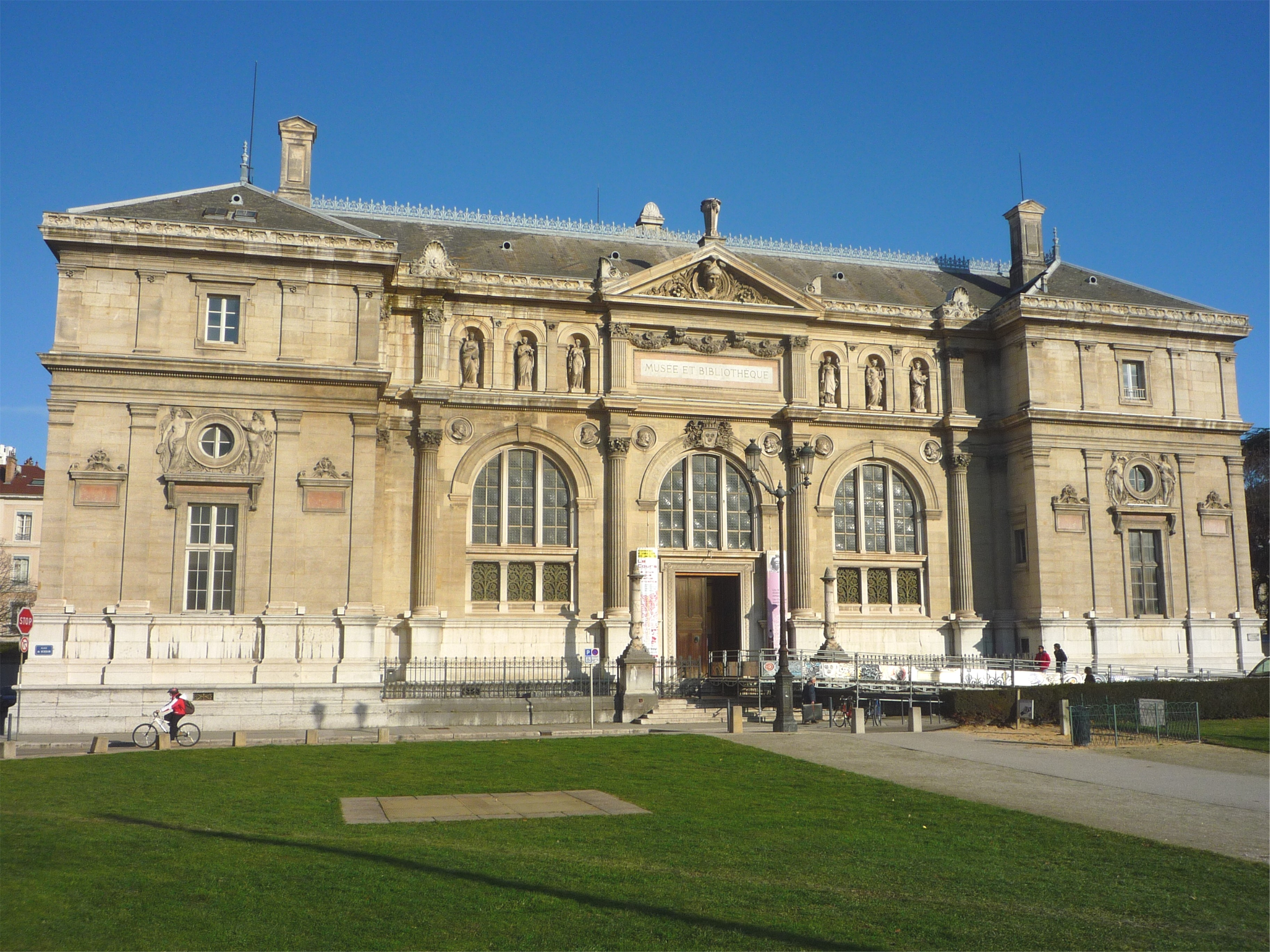 Ancien_musée-bibliothèque (1872), place de Verdun - Grenoble